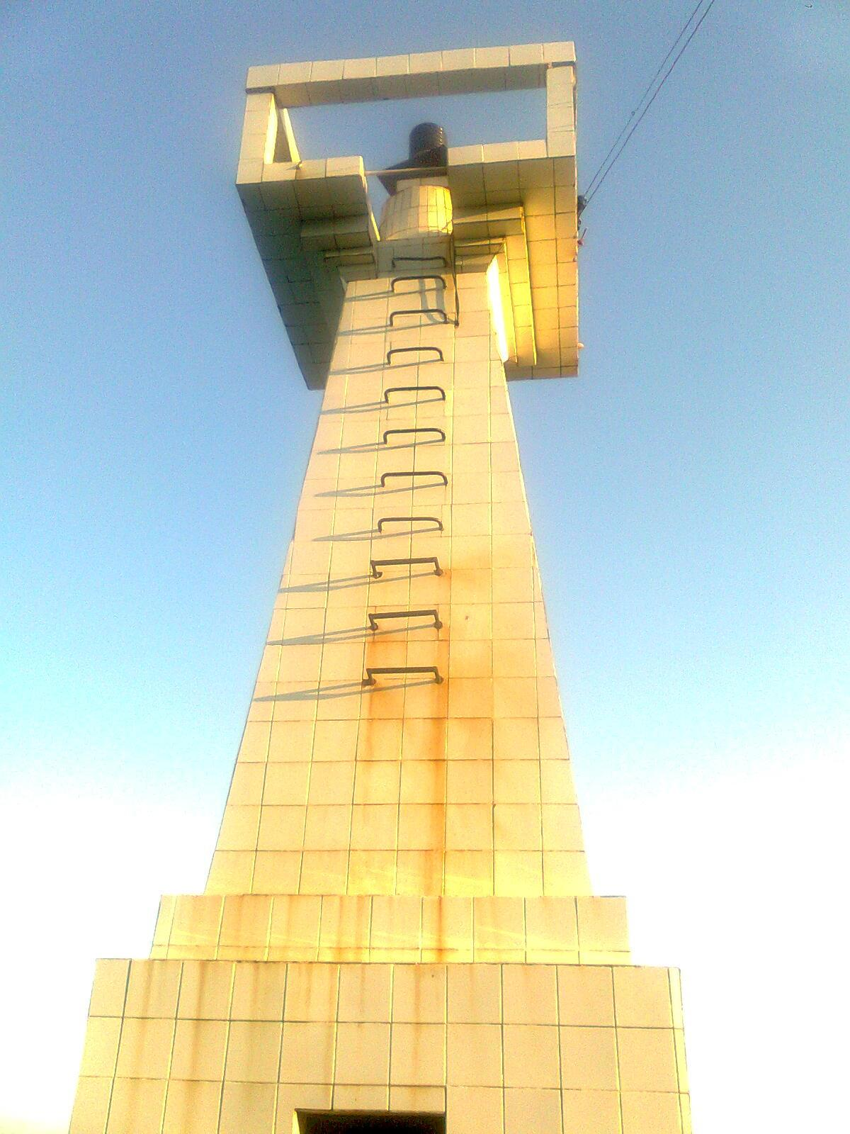 Farol de Imbituba, Santa Catarina, Brasil.